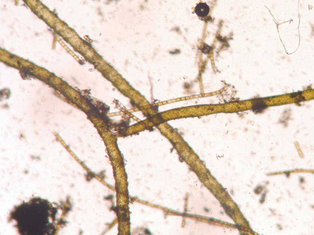 Vaucheria sp ：フシナシミドロ 2015-01-10 和歌山県田辺市：Tanabe City. Wakayama Pref. Japan